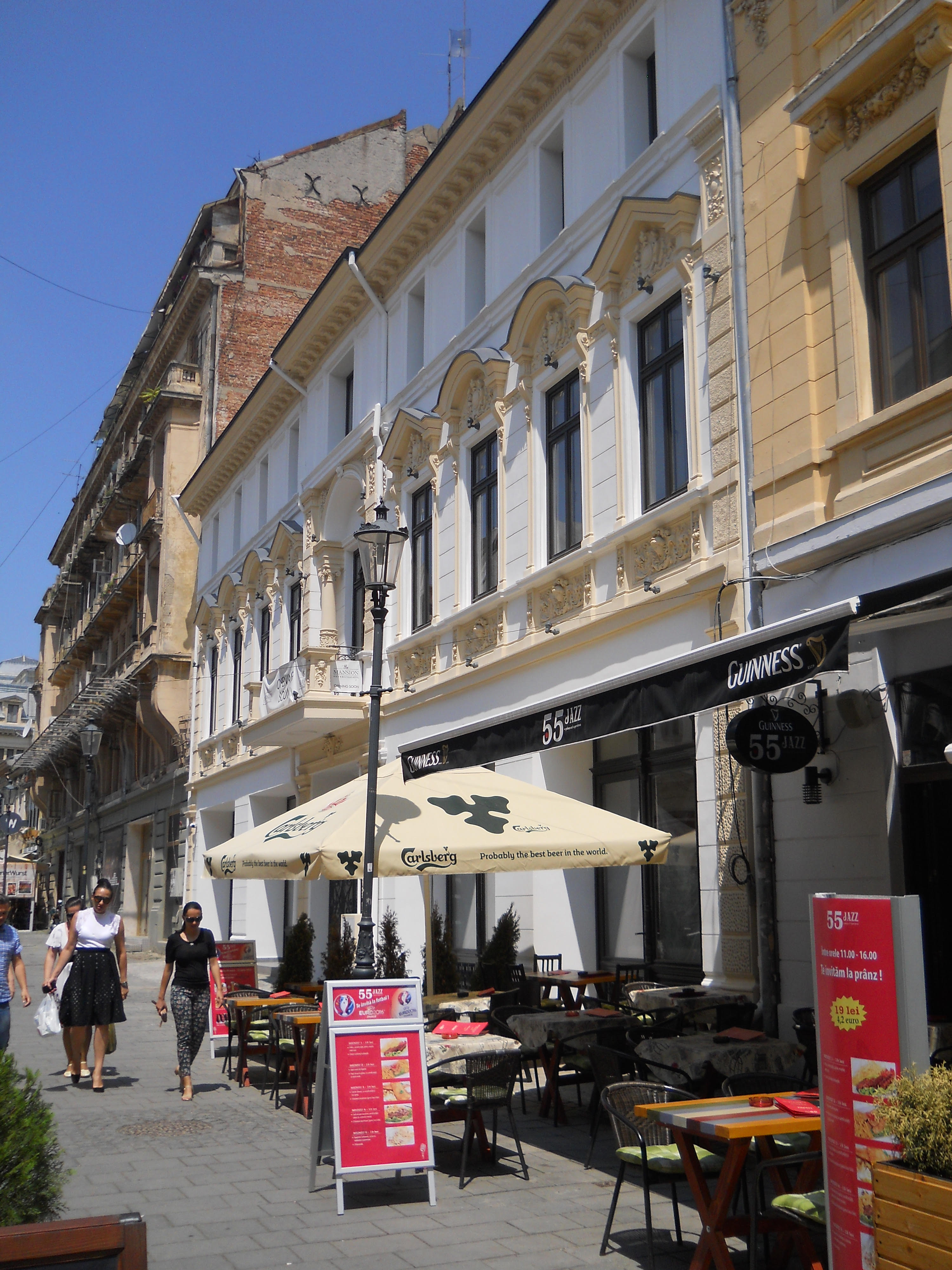 Casă sf. sec. XIX - in prezent hotel (The Mansion Boutique Hotel)